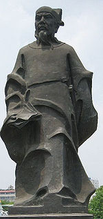 宋人陈亮雕塑